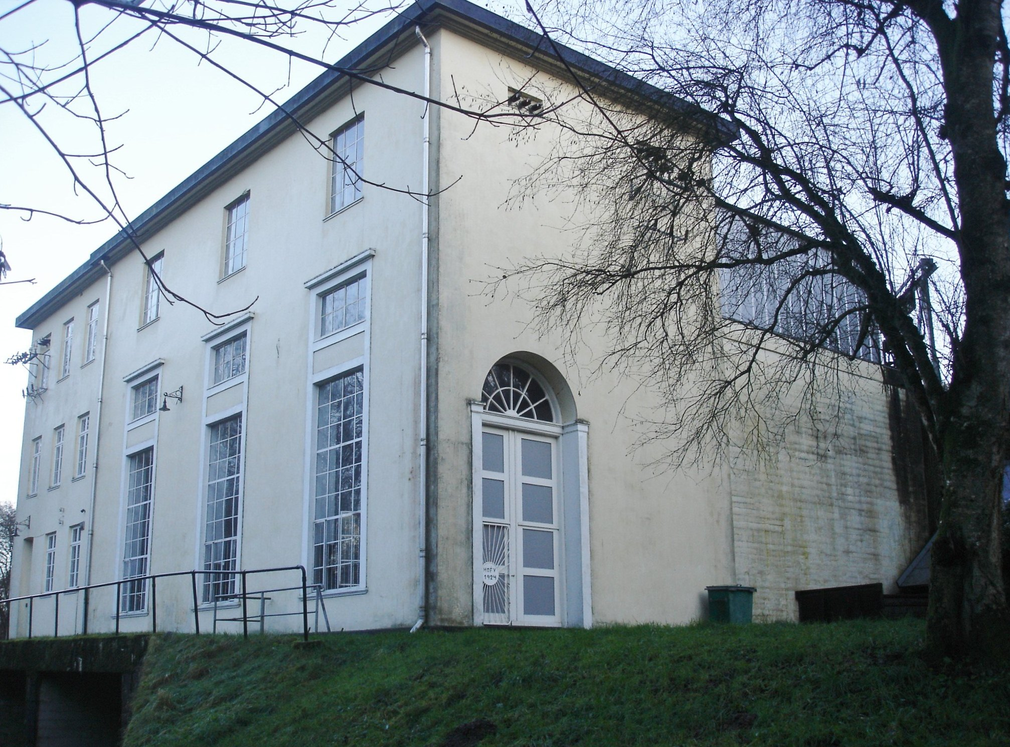 Vestbirk Kraftværk fra vest